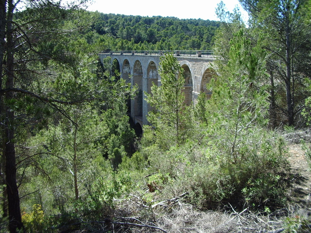 Das größte Viadukt am Via Verde de la Terra Alta andere Versionen